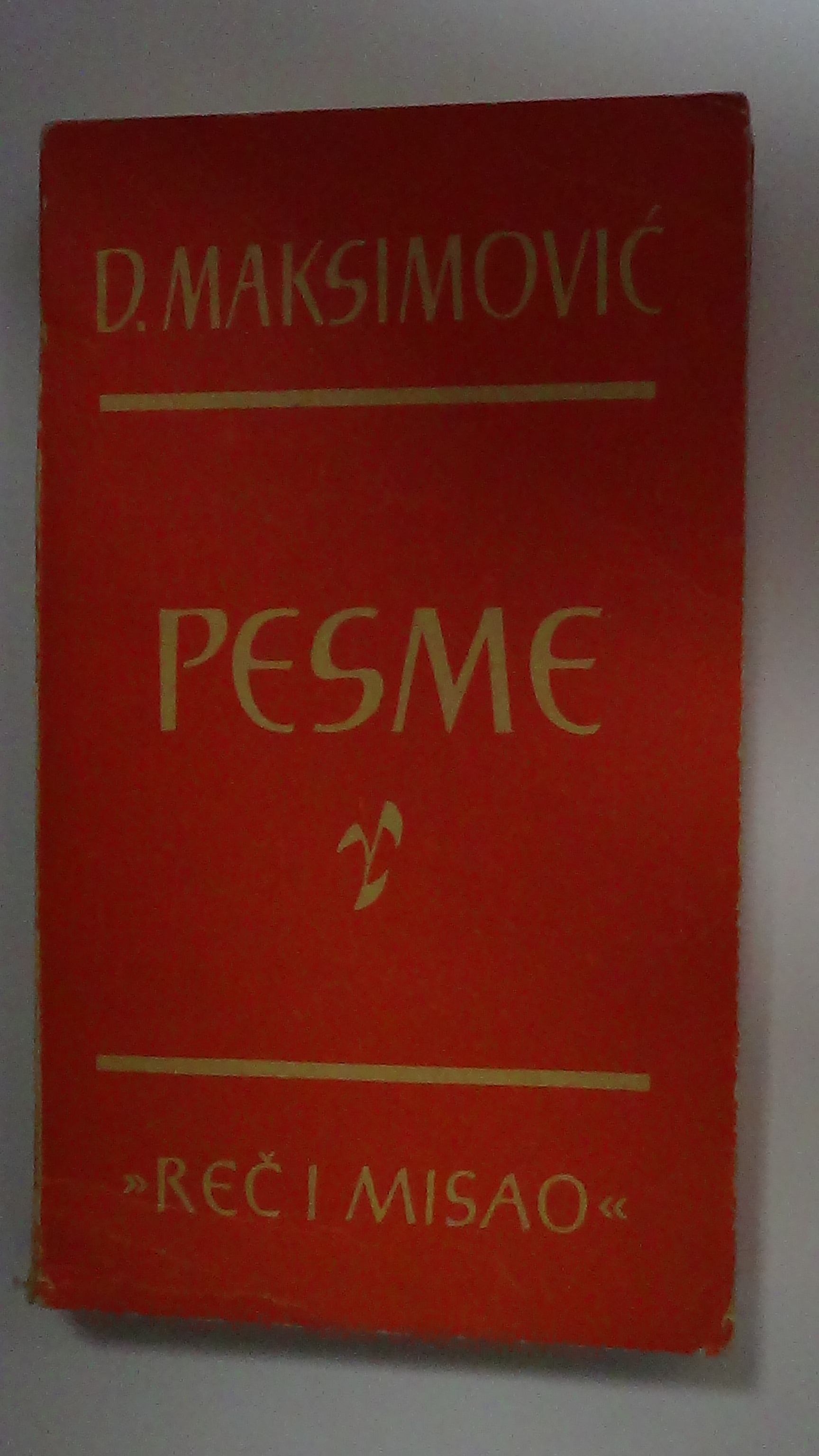 „Песни“,Рад, Белград, 1964.